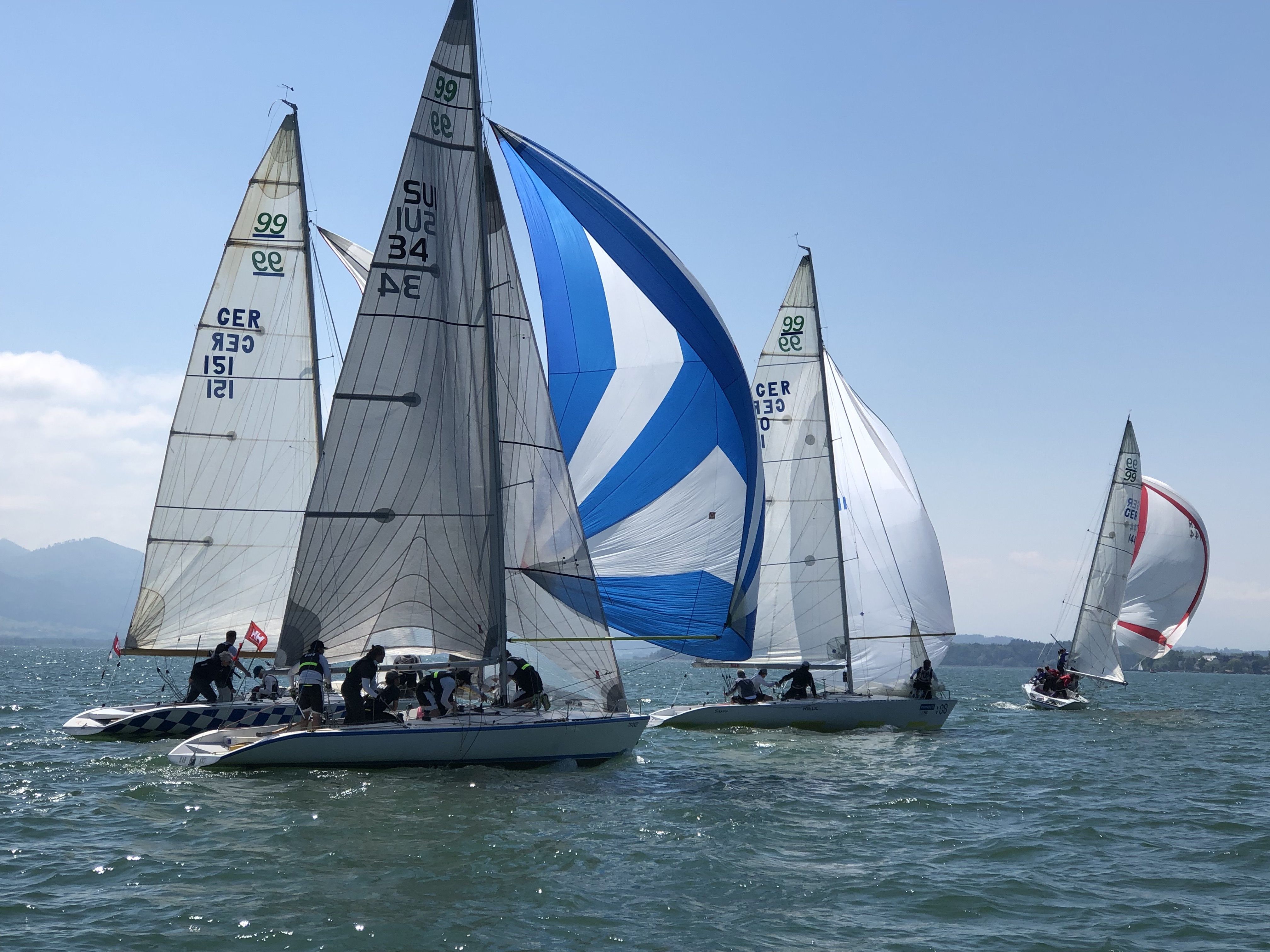 Asso Regatta am Chiemsee